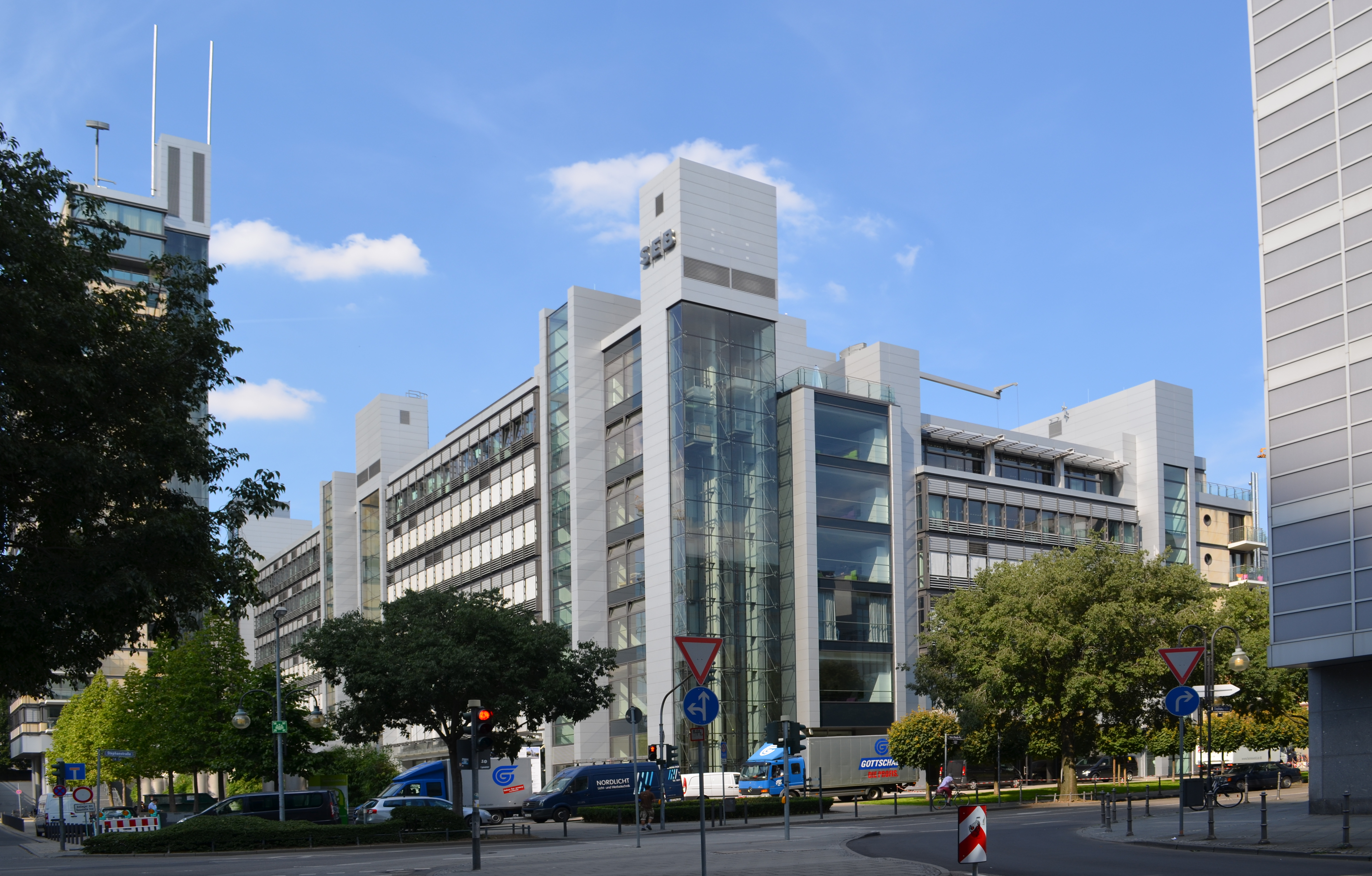 Frankfurt, Skylight nach Einzug der SEB